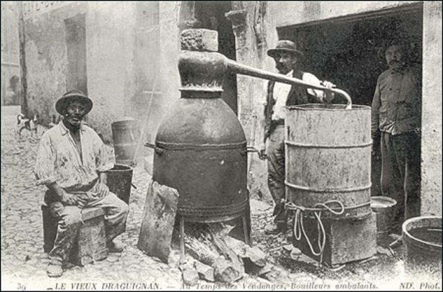 Mobiler Alambic in Draguignan.